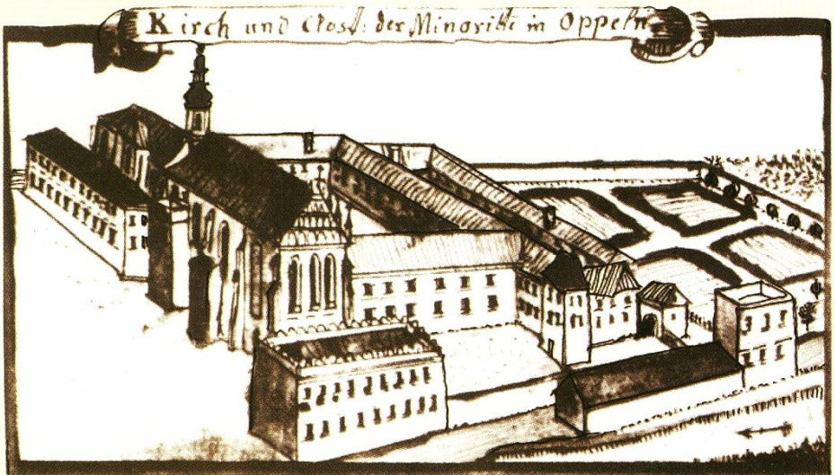 Franziskaner Church in Opole, Poland (1764)